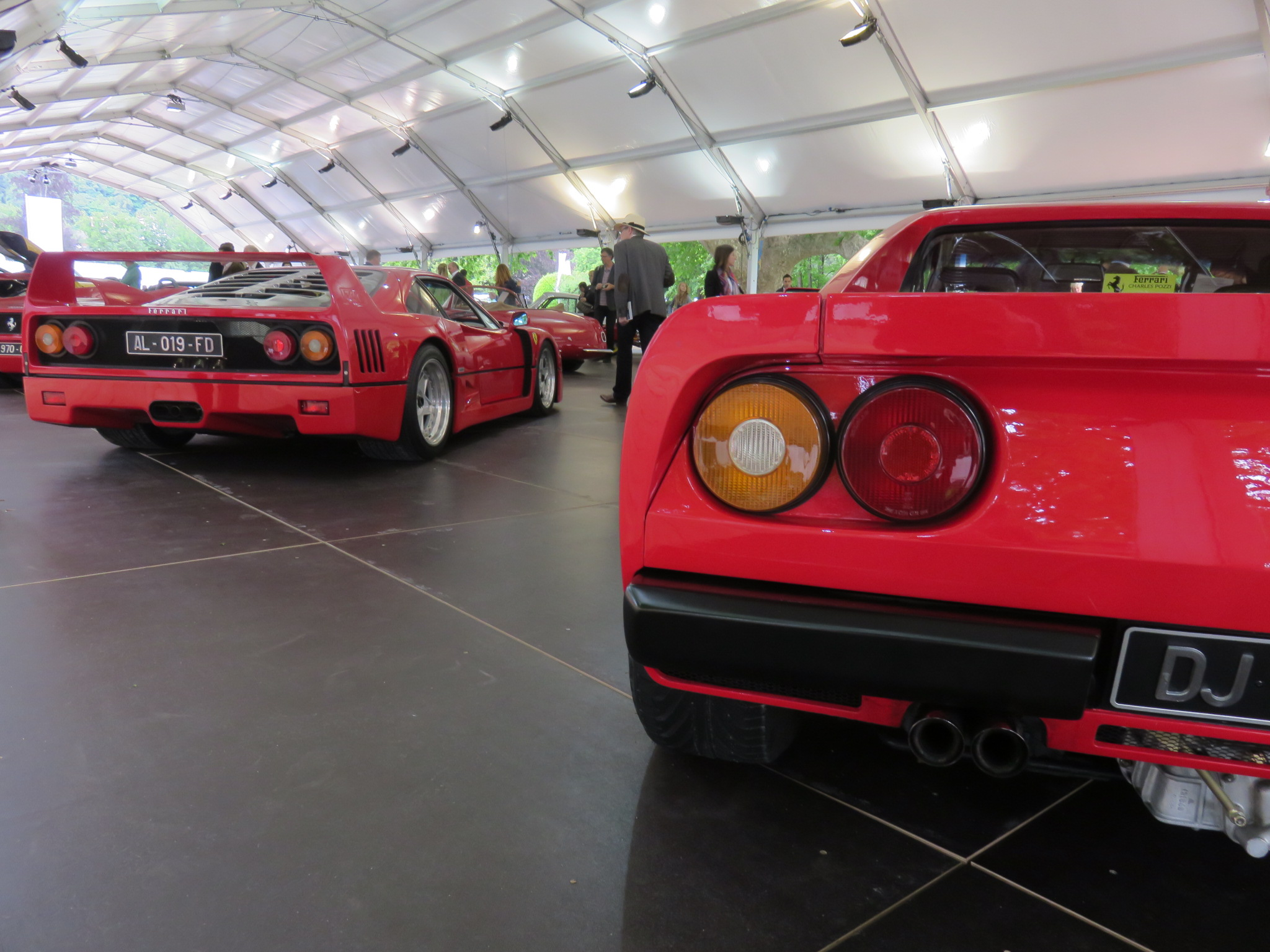 Concorso d'eleganza Villa d'Este 2015